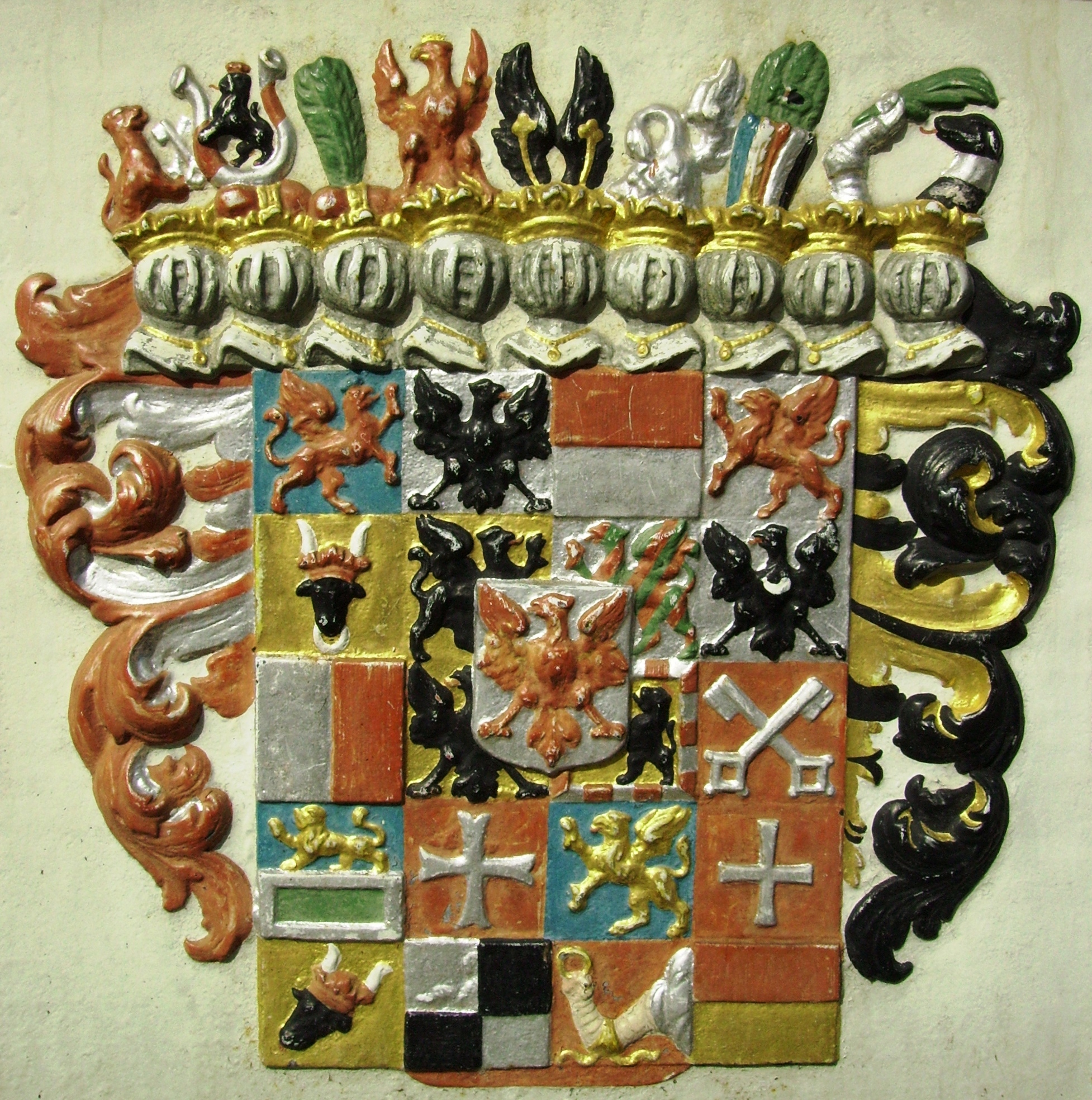 Wappen der Markgrafen von Ansbach am Roehrenbrunnen in Feuchtwangen. Nach 1708. Beschreibung (nach Bernard Peter): Feld 1: Herzogtum Stettin Feld 2: Herzogtum Preußen Feld 3: Herzogtum Magdeburg Feld 4: Herzogtum Pommern Feld 5: Herzogtum Mecklenburg Feld 6: Herzogtum Kassuben Feld 7: Herzogtum Wenden Feld 8 Anspruch auf das Herzogtum Schlesien, Herzogtum Crossen Feld 9: Fürstentum Halberstadt Feld 10: Herzogtum Jägerndorf Feld 11: Burggrafen von Nürnberg Feld 12: Fürstentum Minden Feld 13: Fürstentum Schwerin Feld 14: Fürstentum Camin Feld 15: Grafschaft Rostock Feld 16: Fürstentum Ratzeburg Feld 17: Fürstentum Wenden Feld 18: Stammwappen Hohenzollern Feld 19: Grafschaft Stargard Feld 20: Grafschaft Schwerin Herzschild: Brandenburg Schildfuß: Regalienfeld